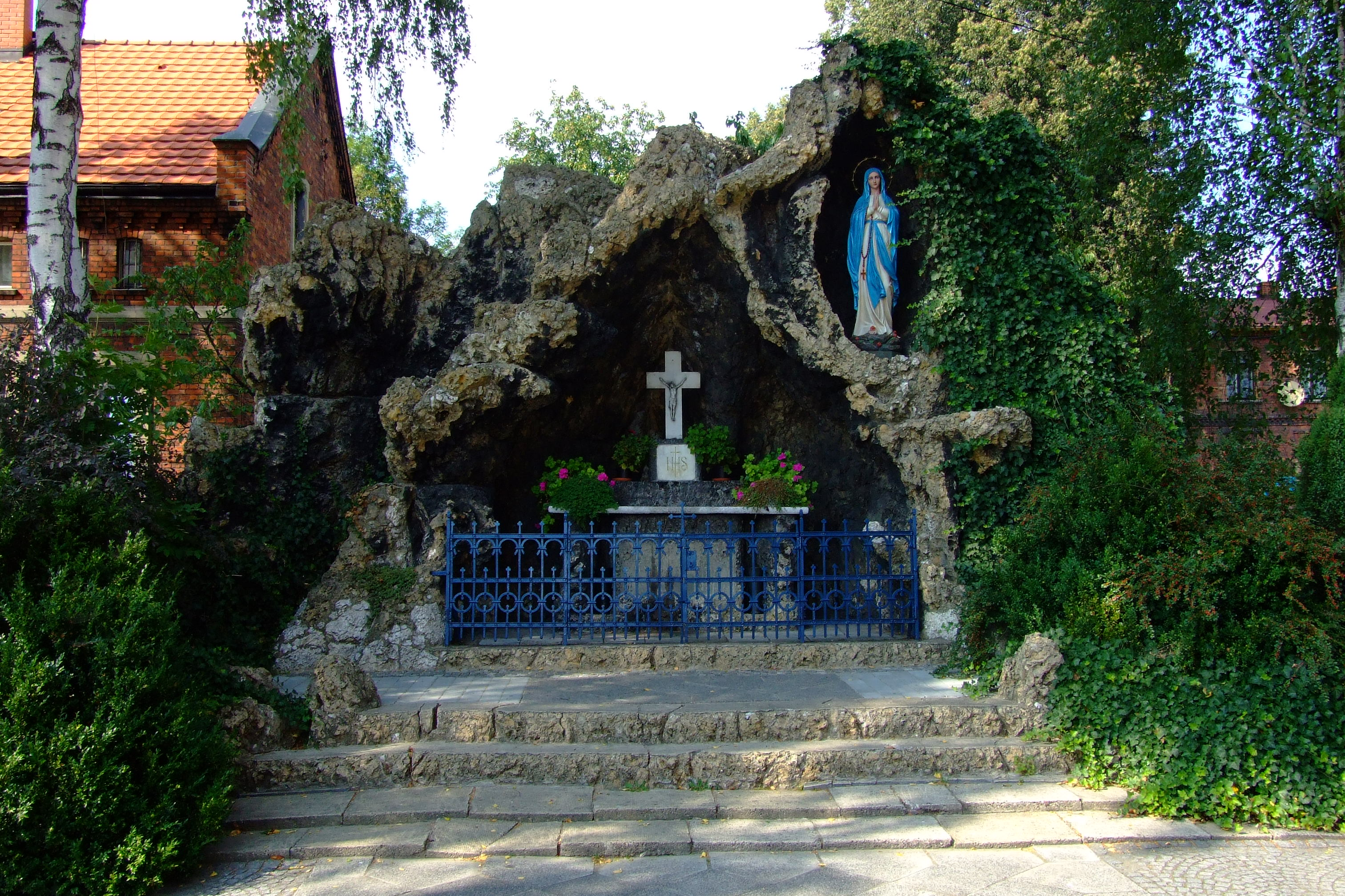 Obejście kościoła św. Mikołaja w Pyskowicach